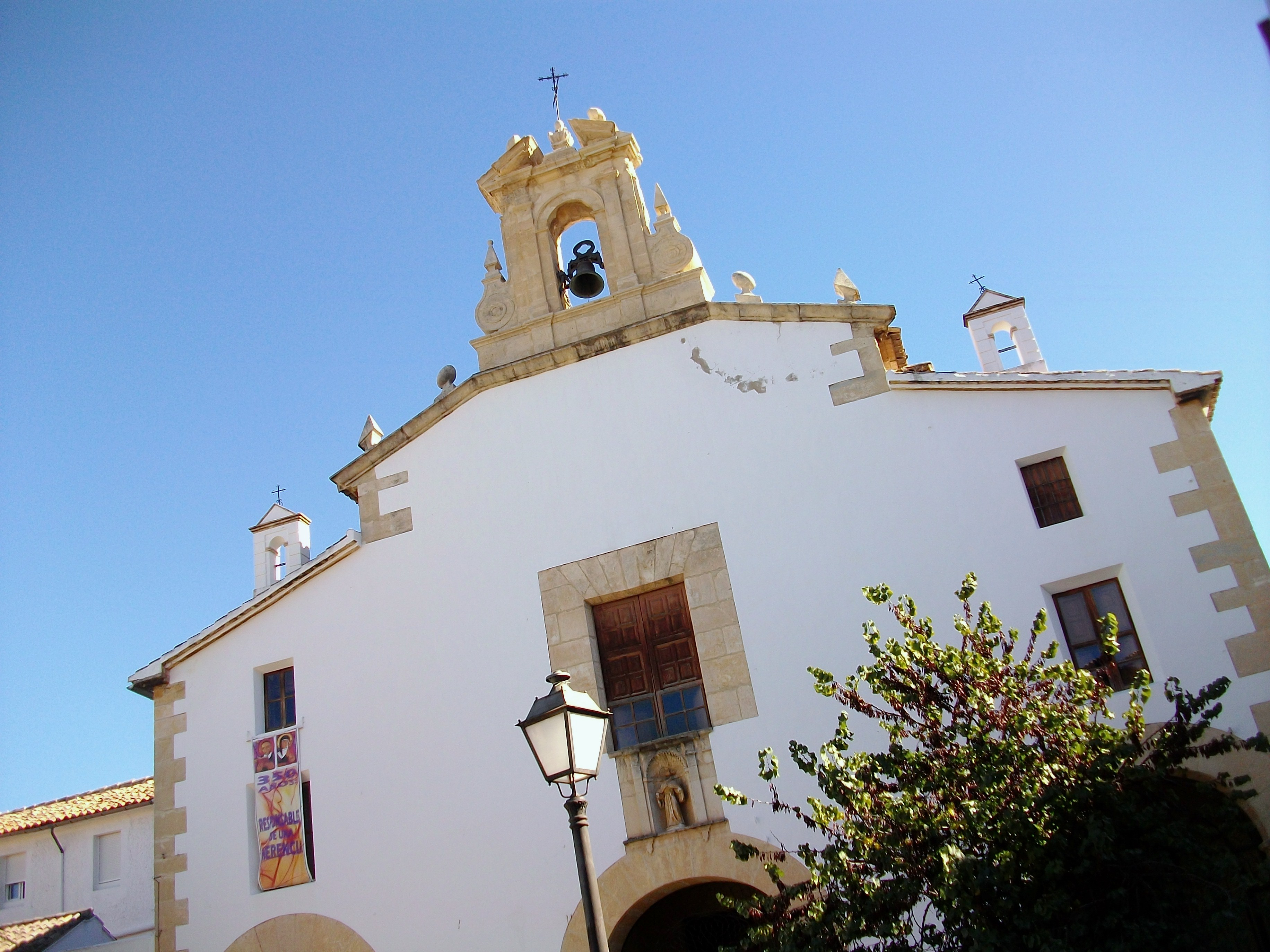 Convent de Sant Onofre, Xàtiva.